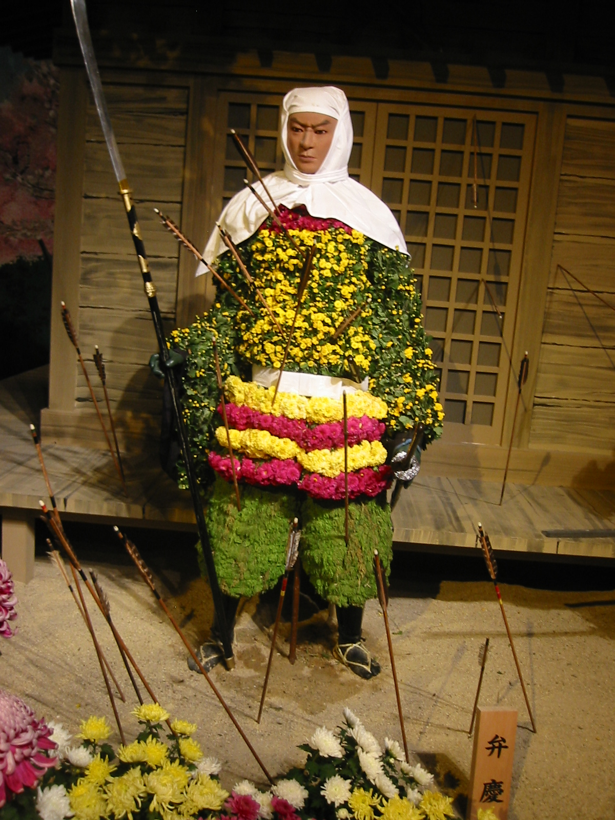 ひらかた大菊人形 義経 第八場面 弁慶、立往生